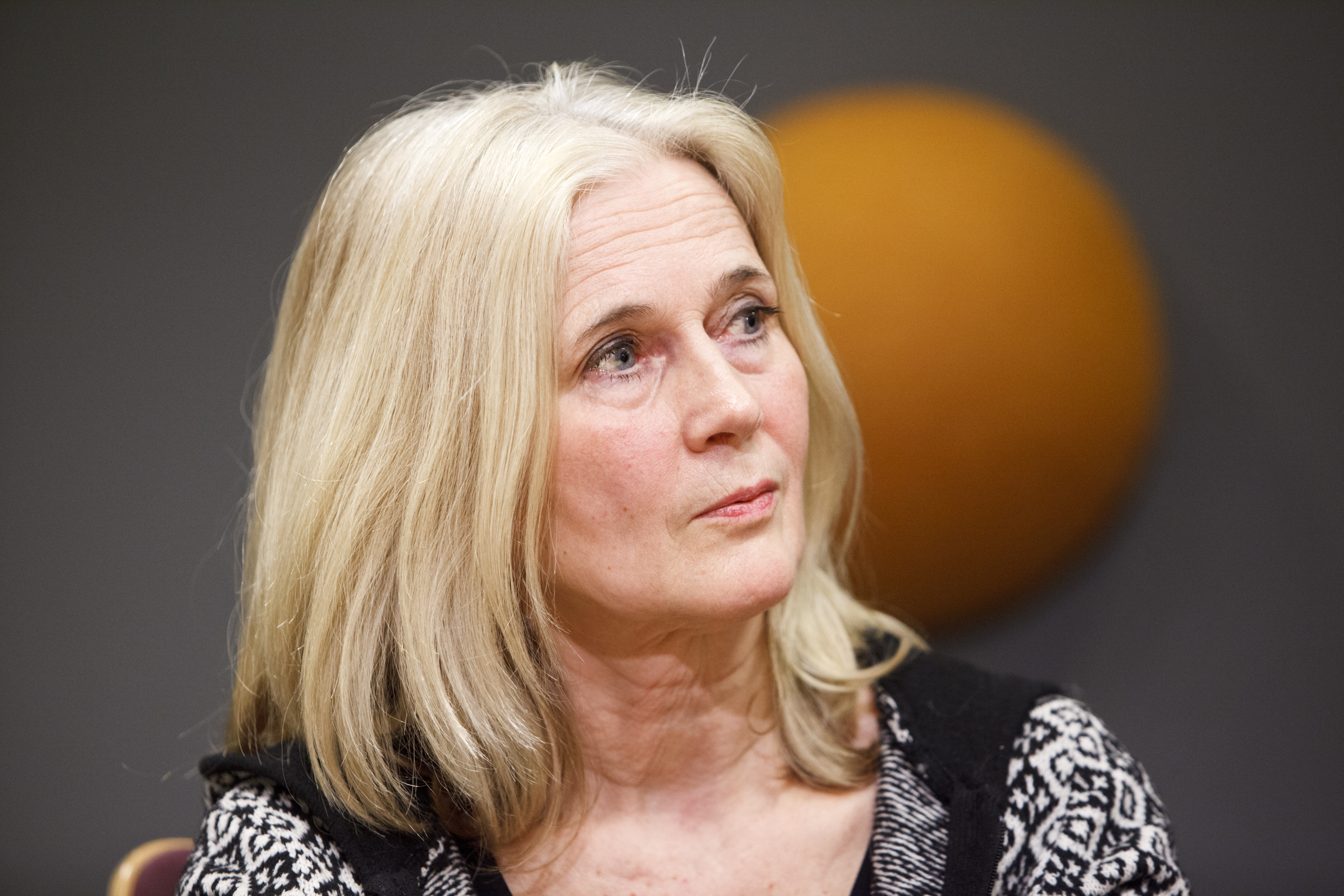 Katarina Frostenson fra Sverige, nomineret til Nordisk Råds litteraturpris 2012 til litteraturarrangement hos Kulturkontakt Nord i Finland.